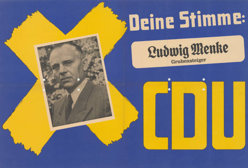 Deine Stimme: Ludwig Menke Grubensteiger CDU Abbildung: Porträtfoto - Stimmkreuz Plakatart: Kandidaten-/Personenplakat mit Porträt Objekt-Signatur: 10-009 : 249.28 Bestand: Landtagswahlplakate Nordrhein-Westfalen (10-009) GliederungBestand10-18: Landtagswahlplakate Nordrhein-Westfalen (10-009) » Landtagswahl am 18.6.1950 » CDU » mit Porträtfoto Lizenz: KAS/ACDP 10-009 : 249.28 CC-BY-SA 3.0 DE